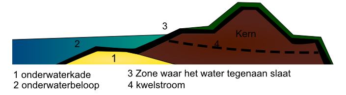 De opbouw van een dijk onder de waterspiegel en met de kwelstroom